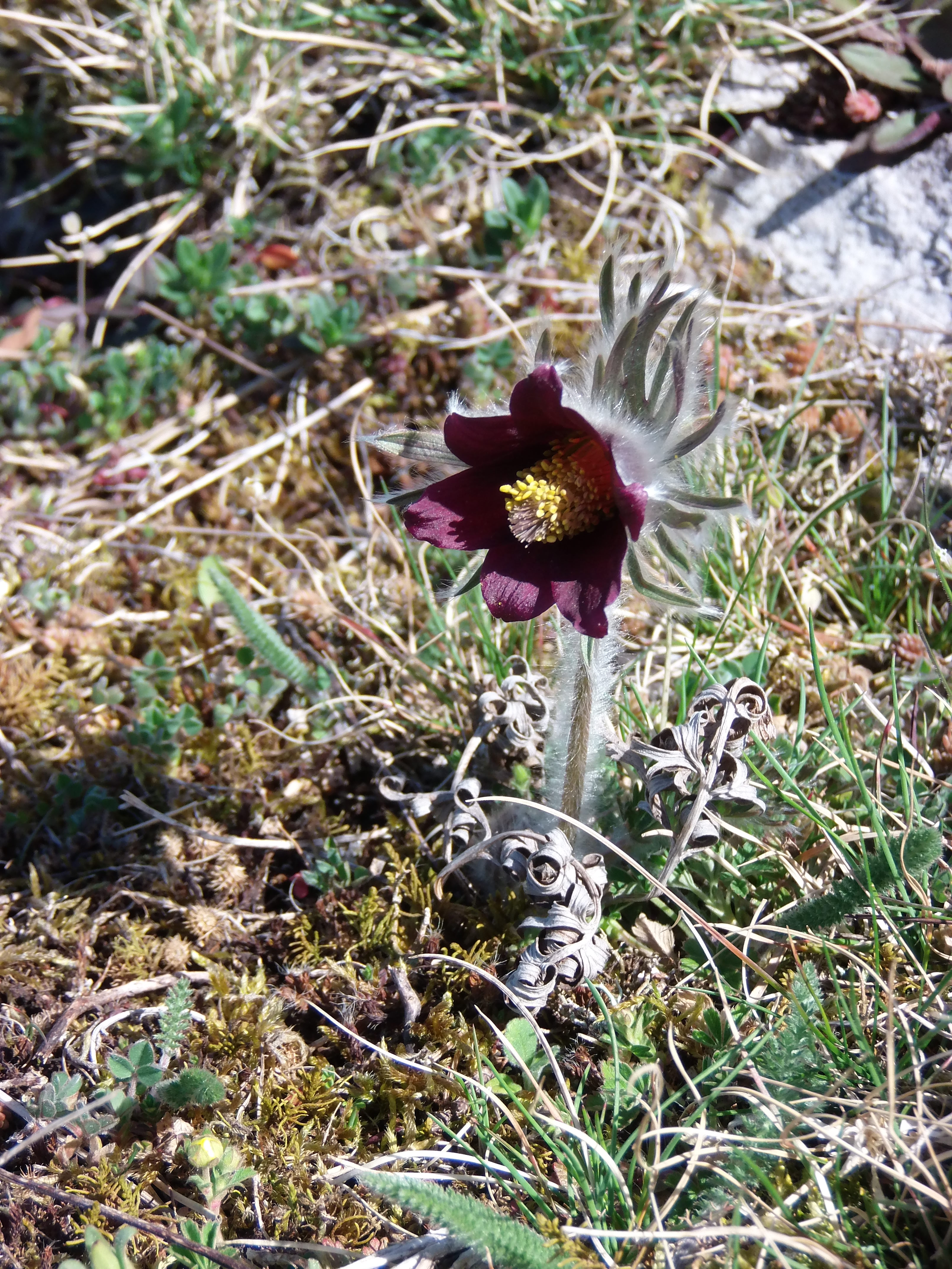 NPP Kotýz - koniklec luční český (Pulsatilla pratensis bohemica) - duben 2015